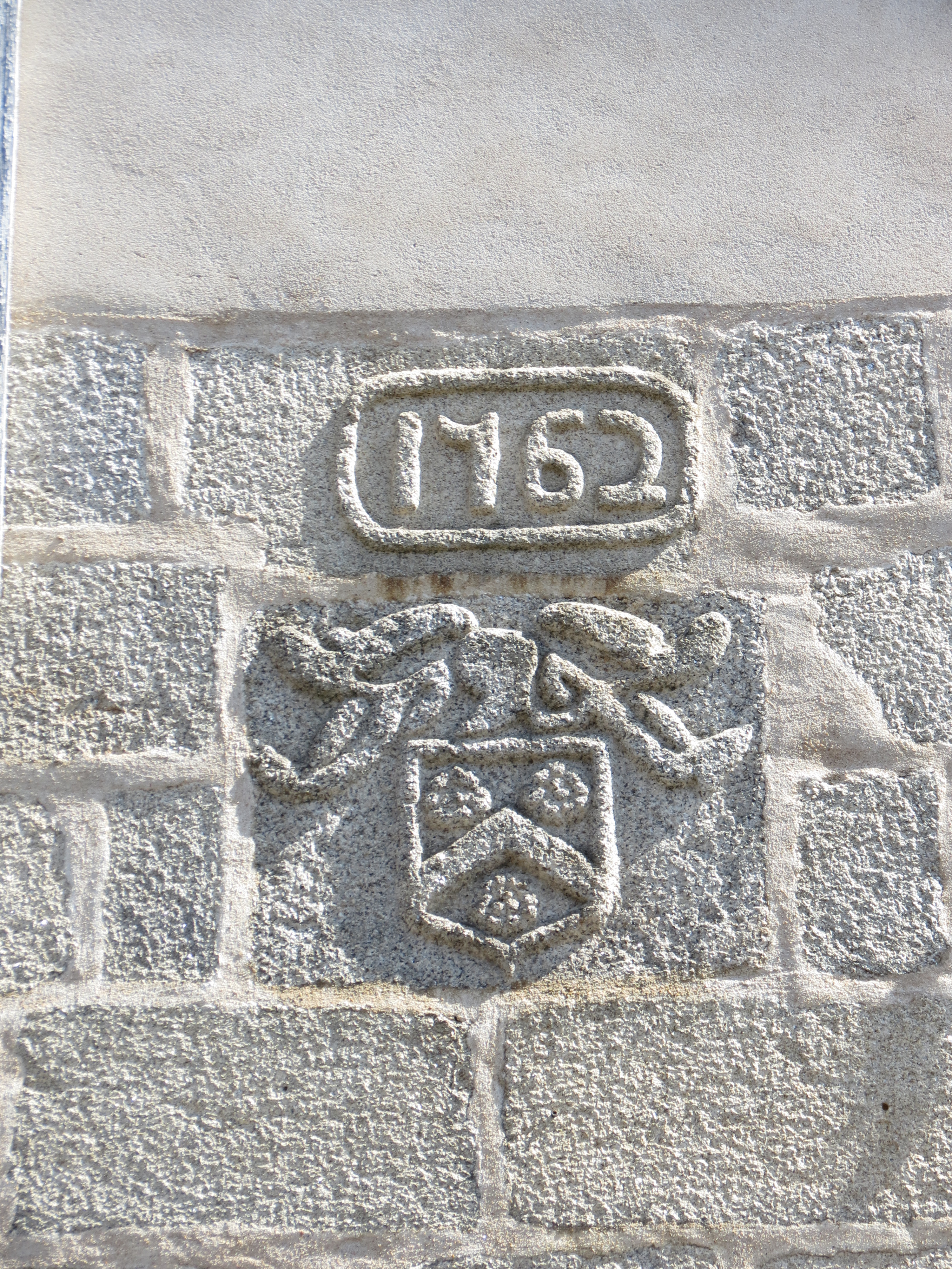 Maison, 42, 44 rue du Jeudi, Alençon, Orne, Normandie.